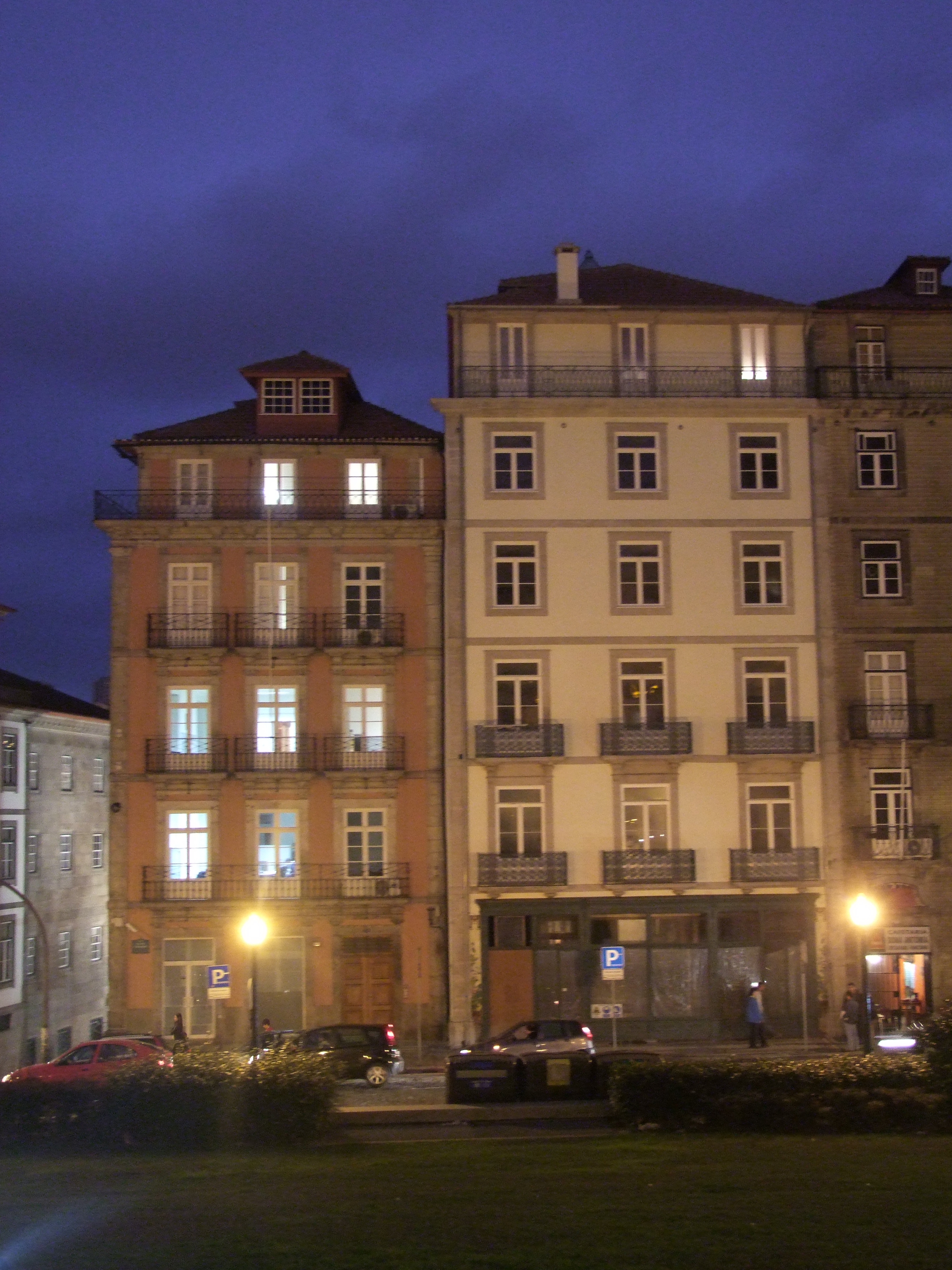 Restaurante Comercial, São Nicolau, Porto, Portugal (DSCF2100)